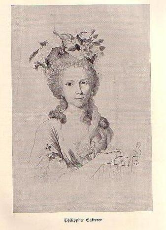 Philippine Engelhard (* 21. Oktober 1756 in Nürnberg; † 28. September 1831 in Blankenburg im Harz), nee Gatterer. Famous German poet.